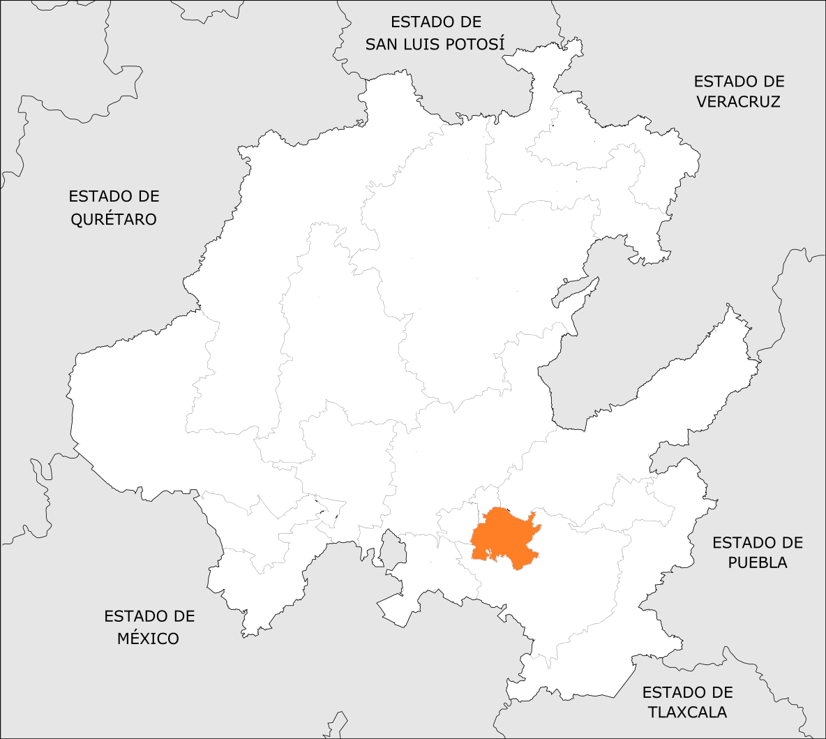 Distrito Electoral Local de Hidalgo 17